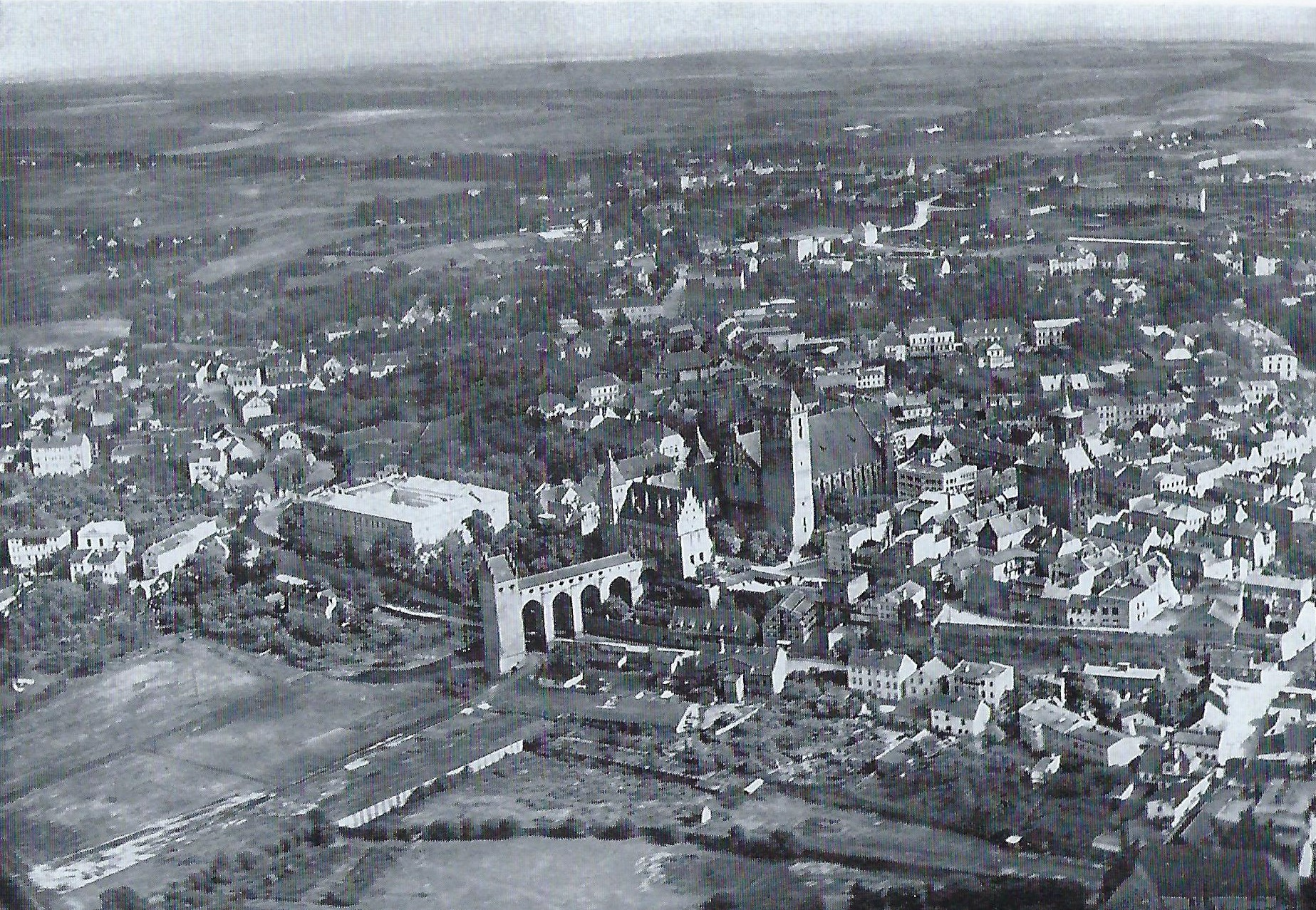 Luftaufnahme von Marienwerder (Kwidzyn)